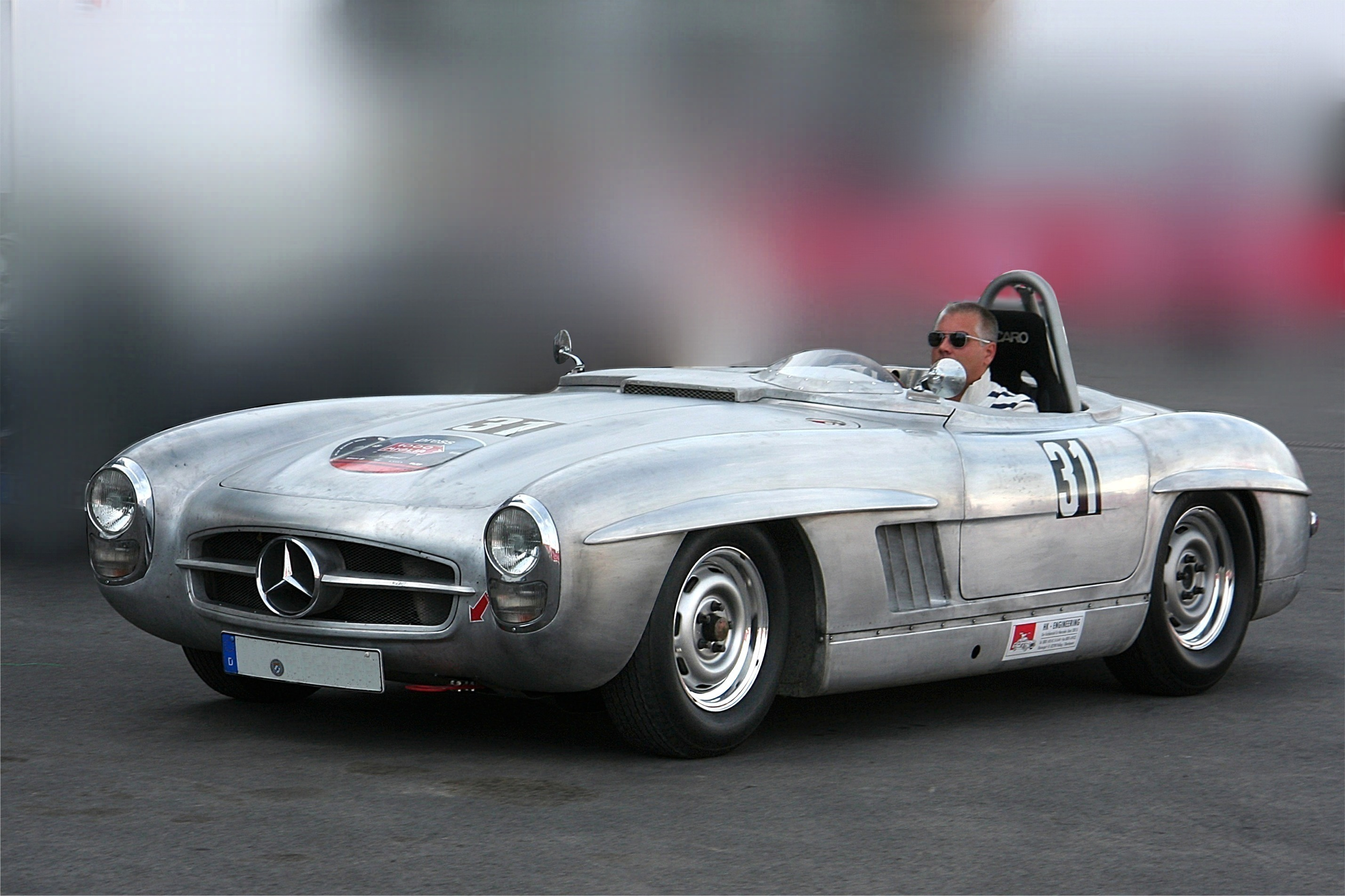 Mercedes-Benz 300 SL Roadster, Bj. 1957, umgebaut zur Rennversion 300 SLS